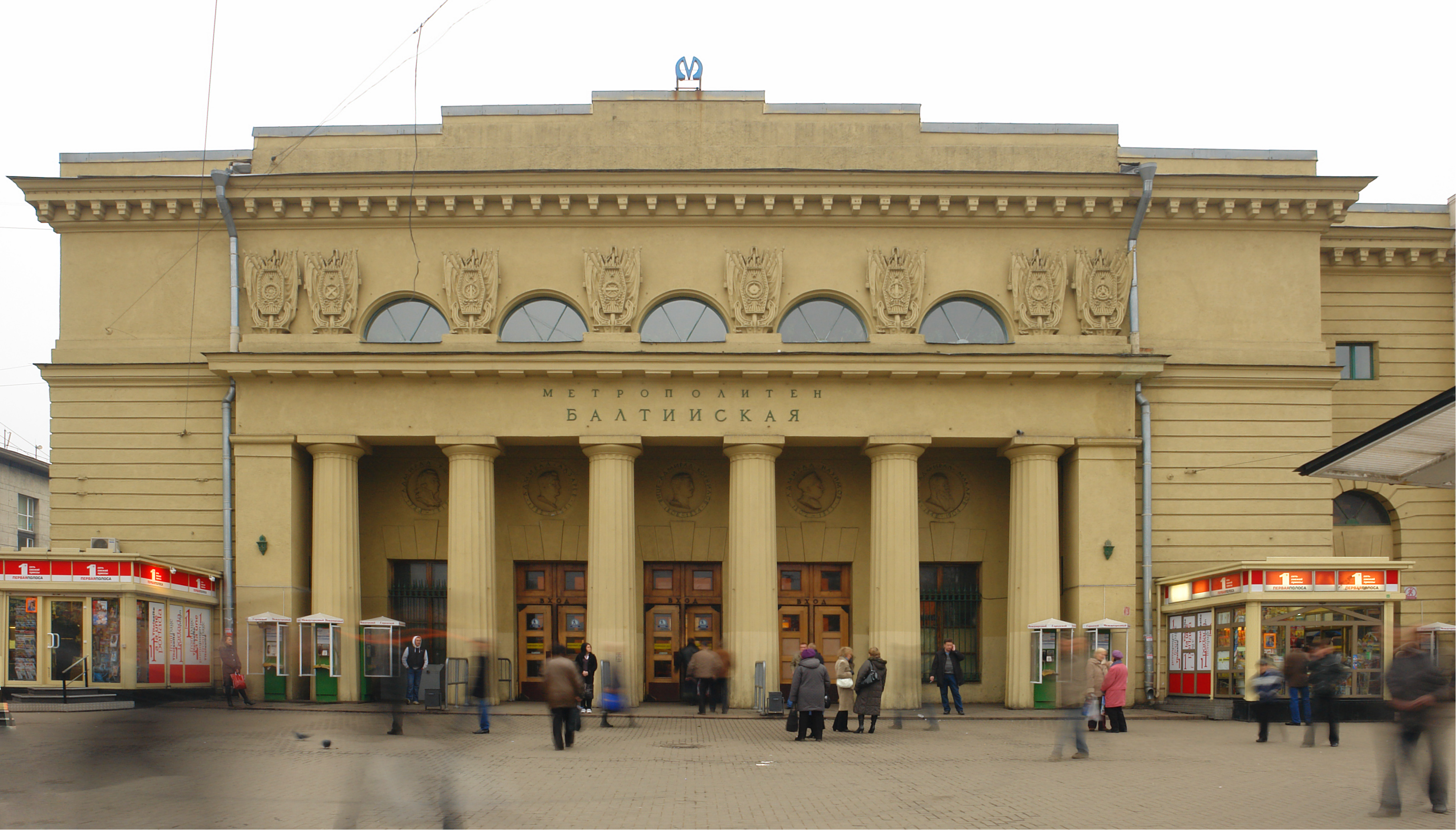 Фасад станции метро Балтийская (Санкт-Петербург) (Facade of the station of the metro Baltic (Saint Petersburg))